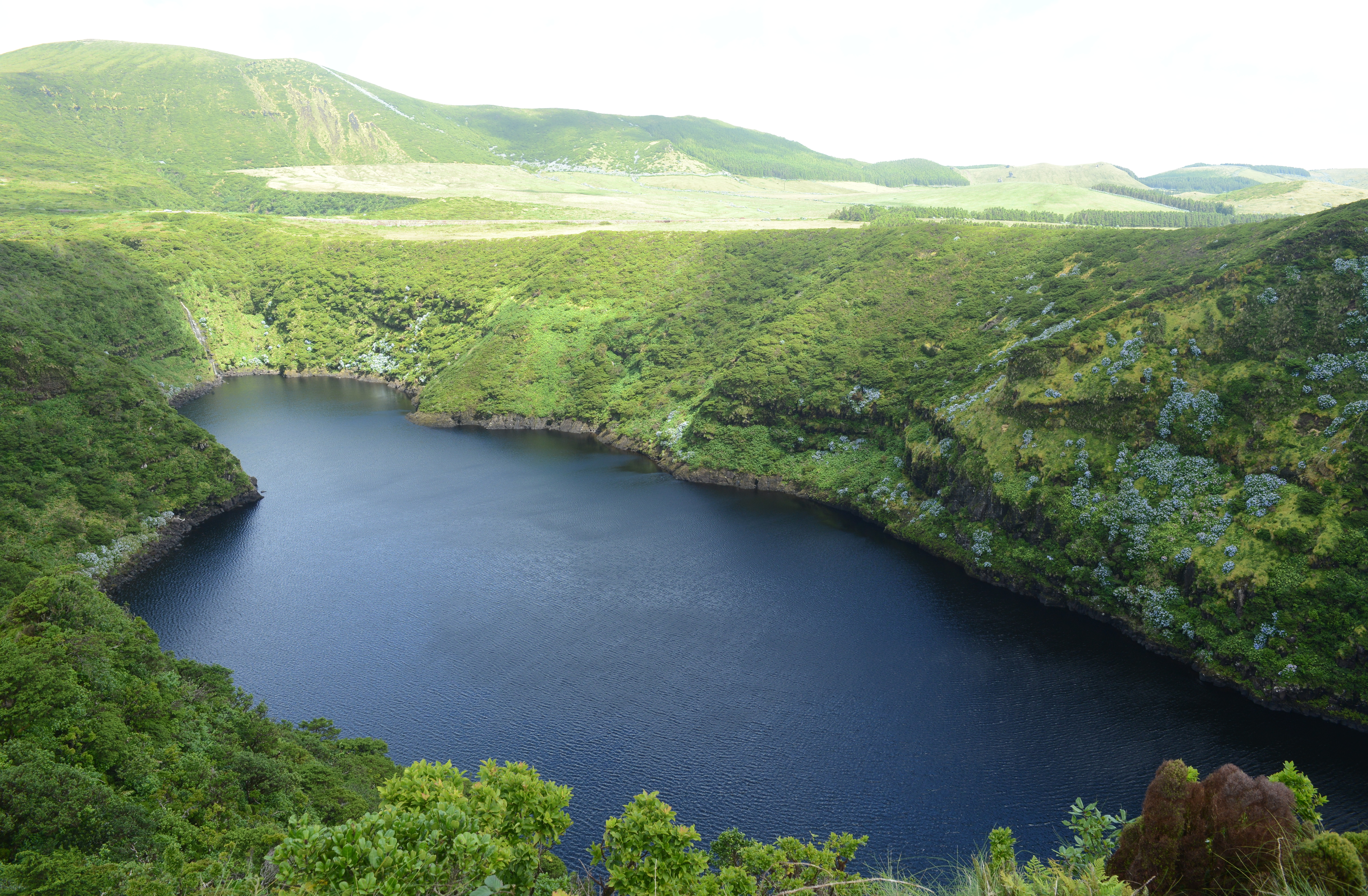 Lagoa Comprida: lago vulcanico nella Caldeira Comprida, isola di Flores, Azzorre.